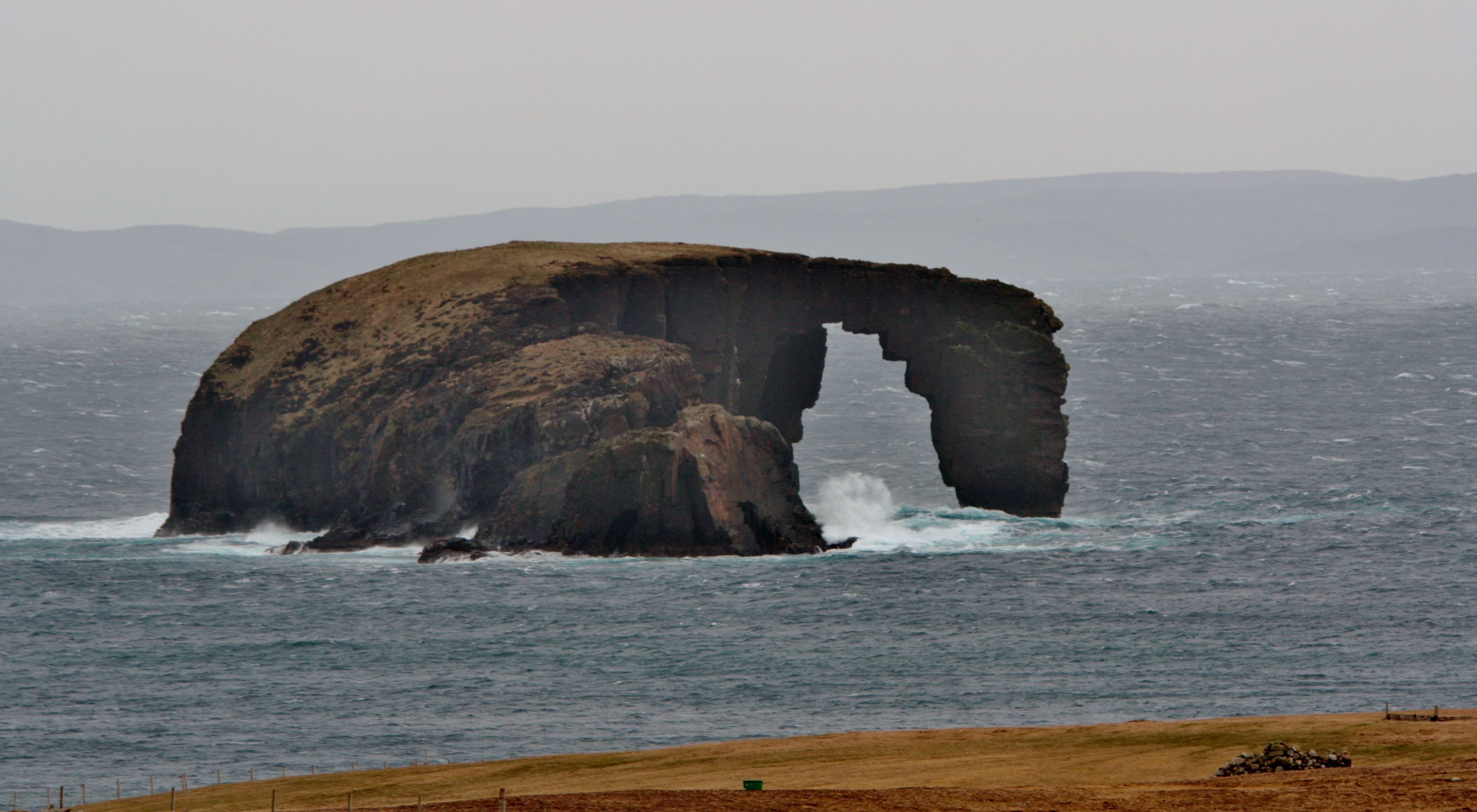 Dore Holm IMG_1519